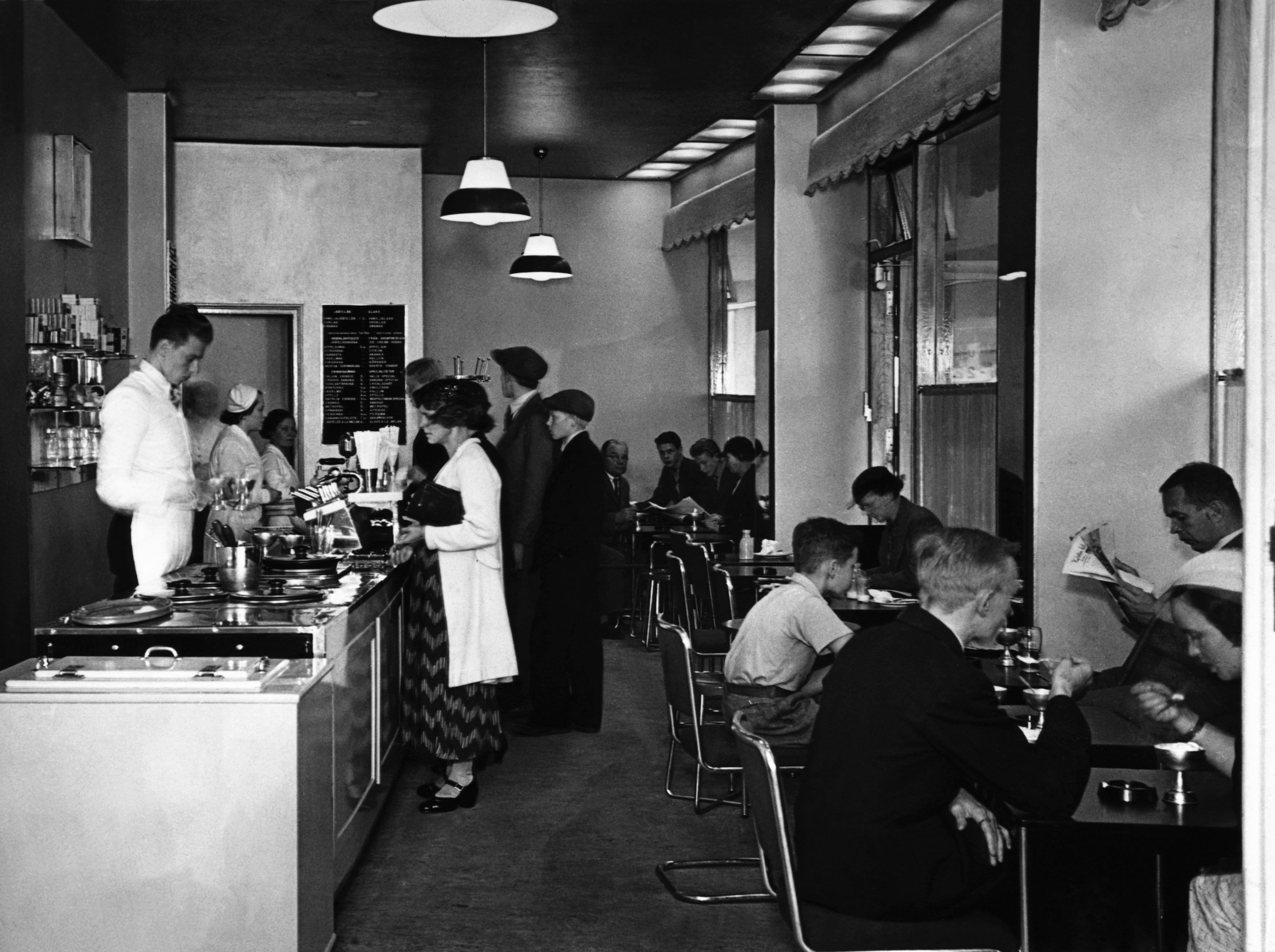 Valion jäätelöbaari Lasipalatsissa, Läntinen Heikinkatu 28 (Mannerheimintie 22-24). Kuva Aarne Pietinen